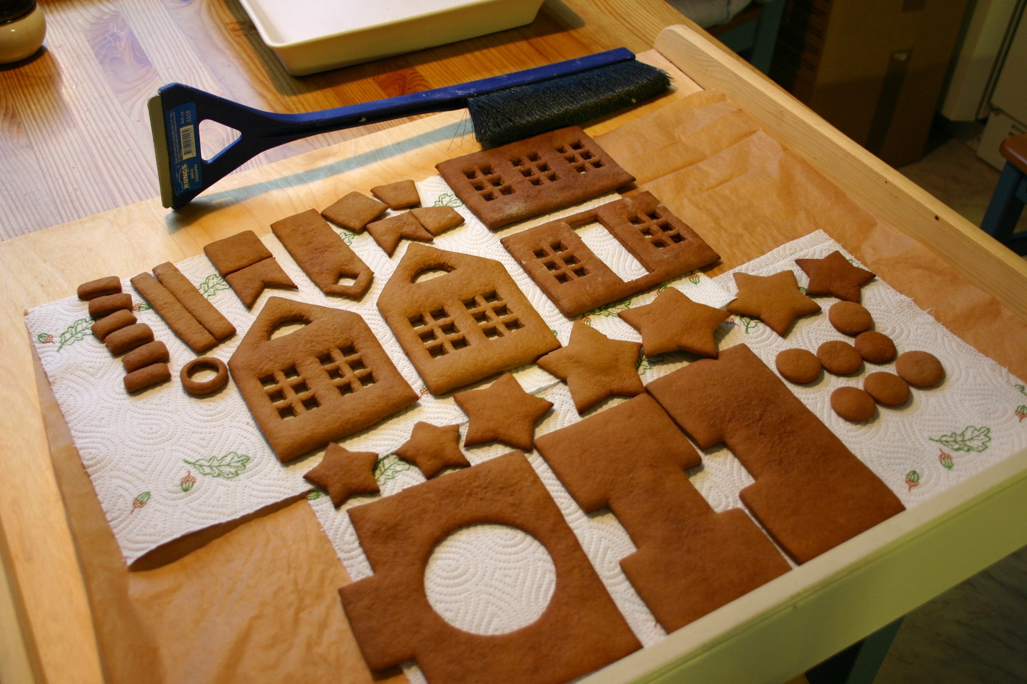 Dough recipe from (in Finnish) Made patterns myself using photoshop, inspired by a nearby old house which is recently demolished. Taikinan resepti netistä ja kaava omasta päästä. Jääkaavin ja lumiharja käytetään myös leivinlaudan puhdistumiseen.